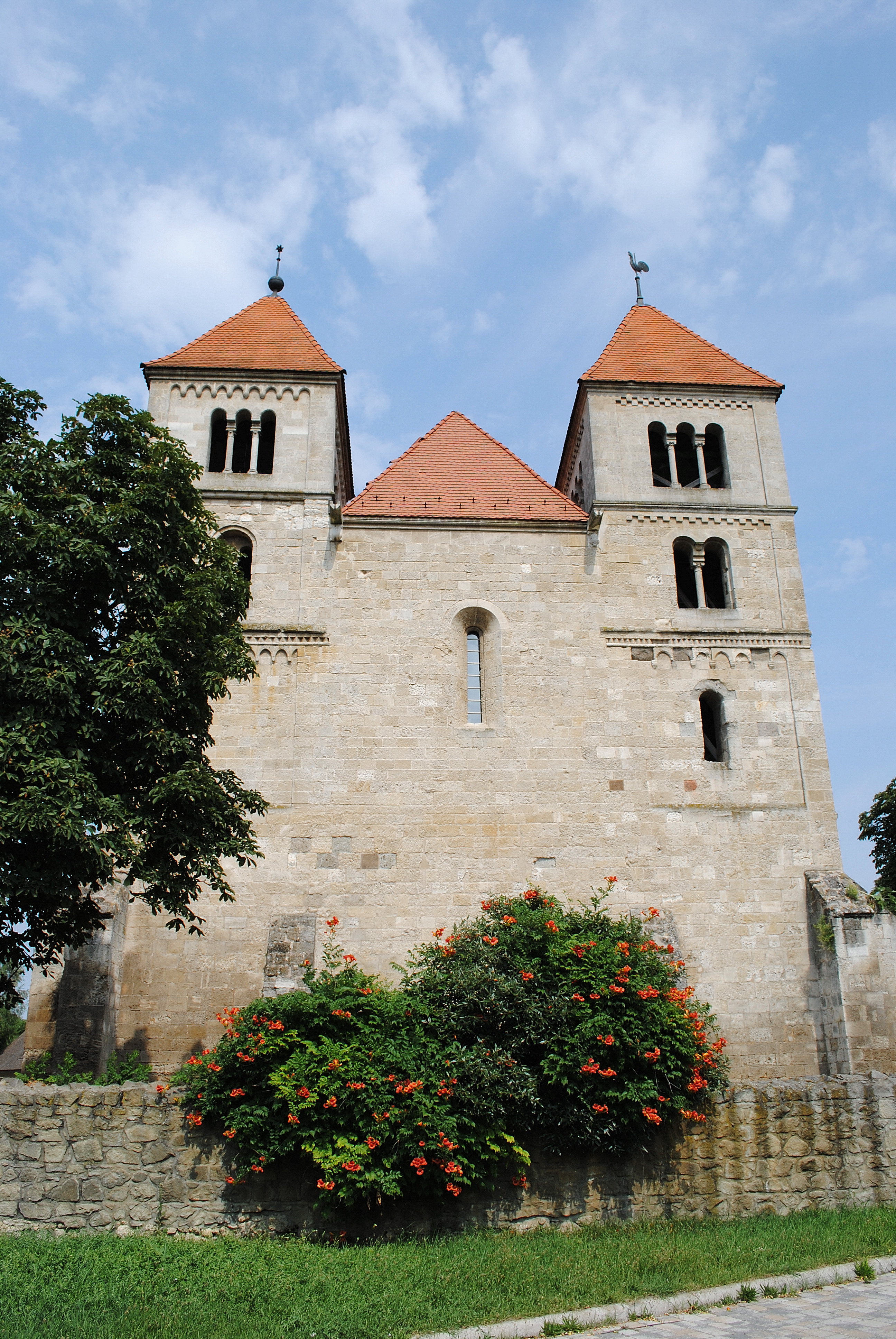 Református templom, volt premontrei prépostsági templom (Ócsa, Bercsényi u.) This is a photo of a monument in Hungary. Identifier: 7192